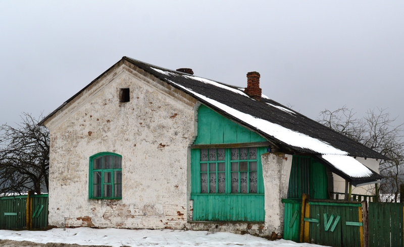 Комплекс зданий почтовой станции в д. Боровая Бобруйского района, XIX век